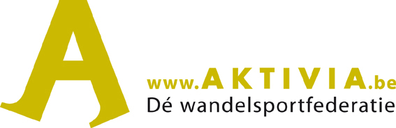 Aktivia - Aalter - België